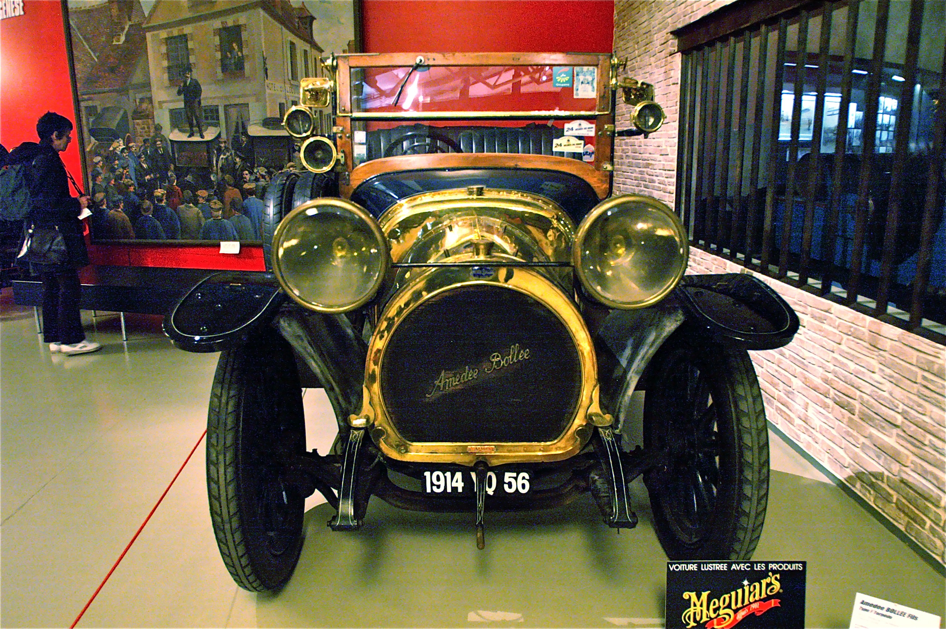 1913 Amédée Bollée Fils Type F 4 litre Torpedo at Le Musee des 24 Heures